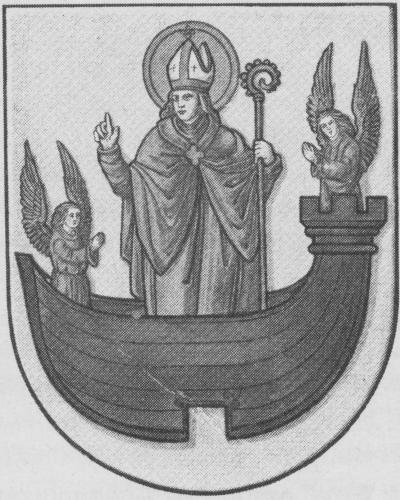 Ehemaliges offizielles Stadtwappen der Stadt Kaub am Mittelrhein, Rheinland-Pfalz, Deutschland. Dieses Wappen wurde von 1907-1956 geführt, es ist eine Variation des Statwappens des 19. Jahrhundert und basiert auf dem städtischen Gerichtssiegel von 1370.